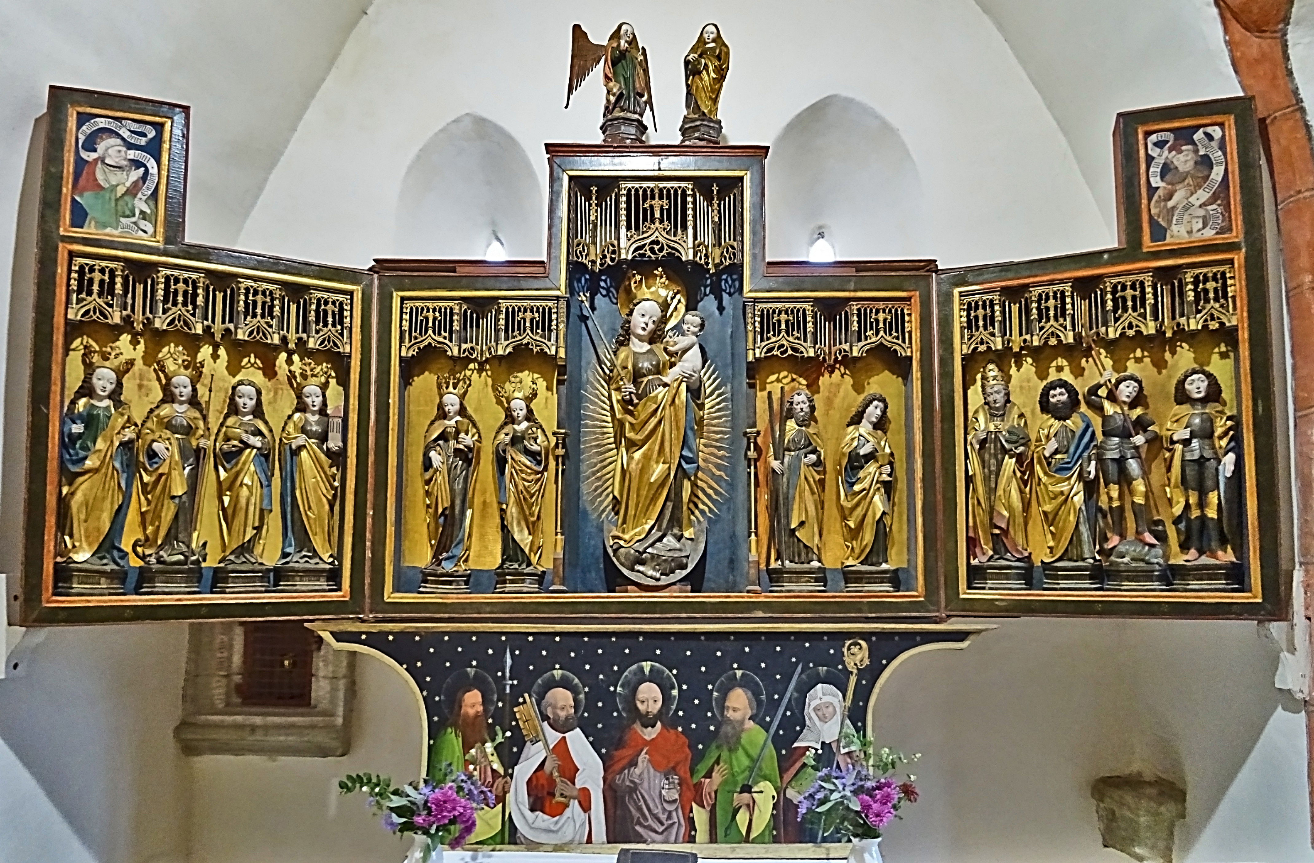 Zeigerheimer Altar aus Saalfelder Schule (um 1490) in der Wehrkirche Zeigerheim (Rudolstadt). Der namentlich nicht bekannte Künstler schuf den Marienaltar. Auf der Festtagsseite im Mittelteil Maria als Himmelskönigin mit dem Jesuskind im Strahlenkranz auf einer Mondsichel. Neben ihr stehen die Heiligen Barbara und Katharina sowie Andreas und Johannes. Der linke Flügel zeigt Ursula, Margarete, Dorothea und Gertrud, der rechte Urban, Bartholomäus, Georg und Gangolf. Die Aufsatzfiguren stellen Maria mit einem Buche und den Engel der Verkündigung dar.